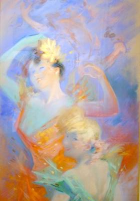 Jules Chéret.